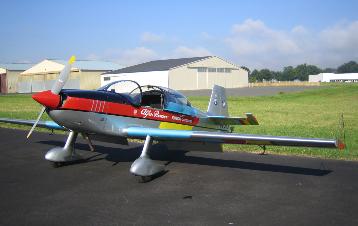 Dyn'Aéro CR.100